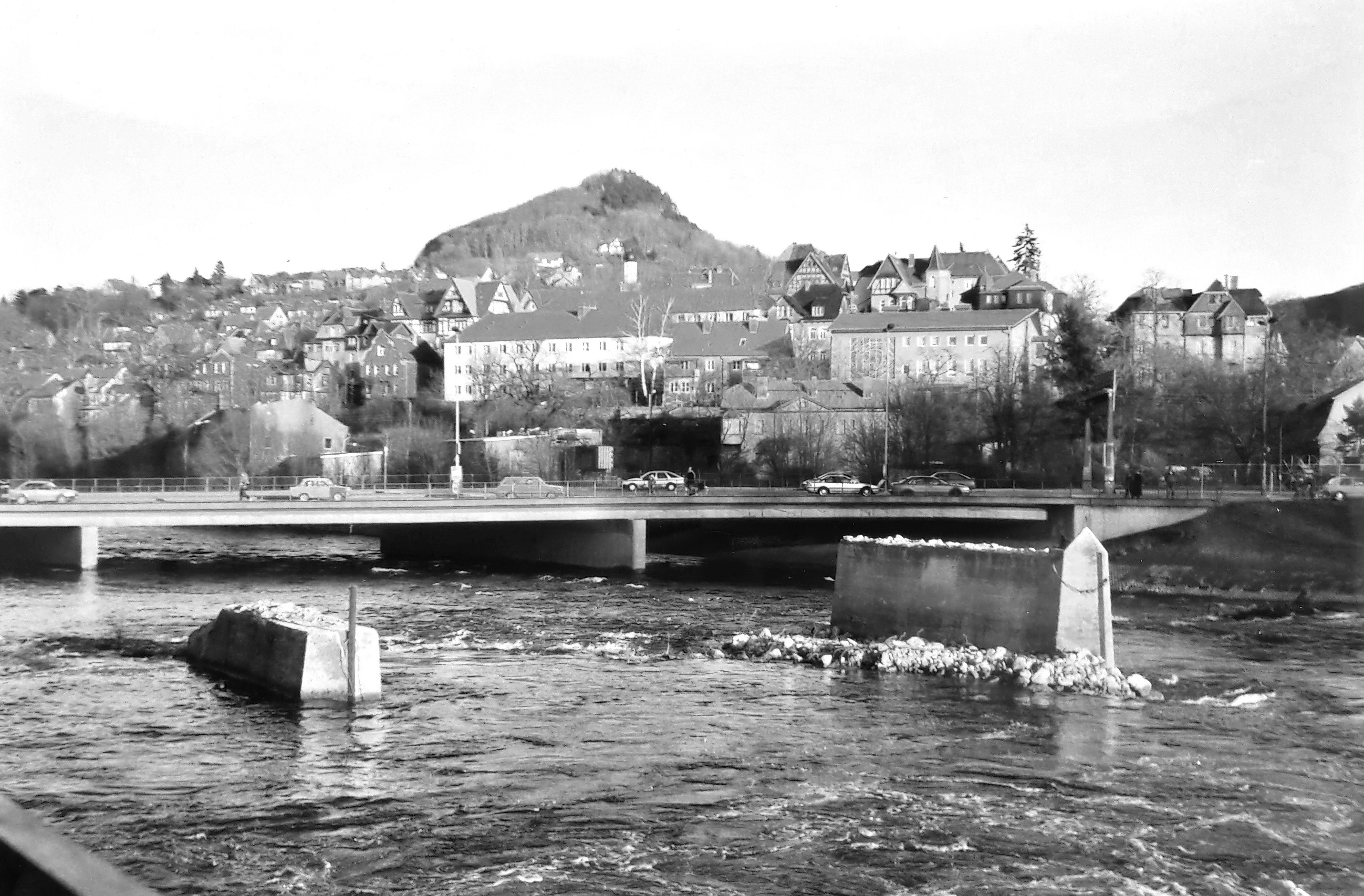 Alte Paradiesbrücke in Jena im Umbau zur Straßenbahnbrücke, Überbauten sind entfernt und Pfeiler gekürzt, Februar 1995